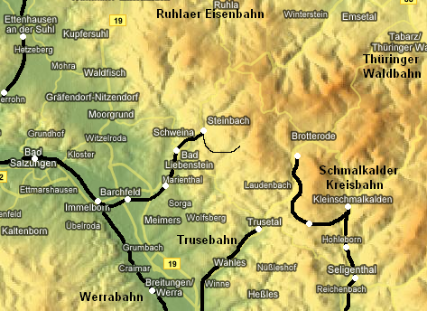 Eisenbahnen im westlichen Thüringer Wald